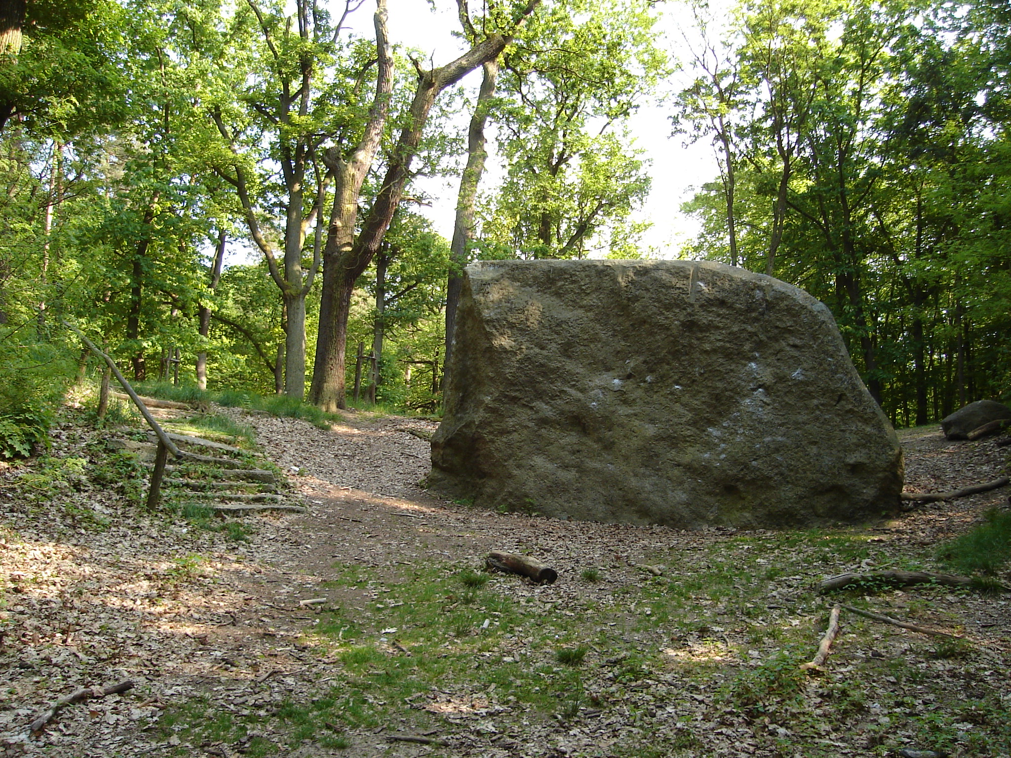 Rauener Steine bei Fürstenwalde